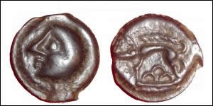 Monnaie des Leuques en potin (Potin Tête chauve des Leuques). Photo du propriétaire Utilisateur:Gblerot